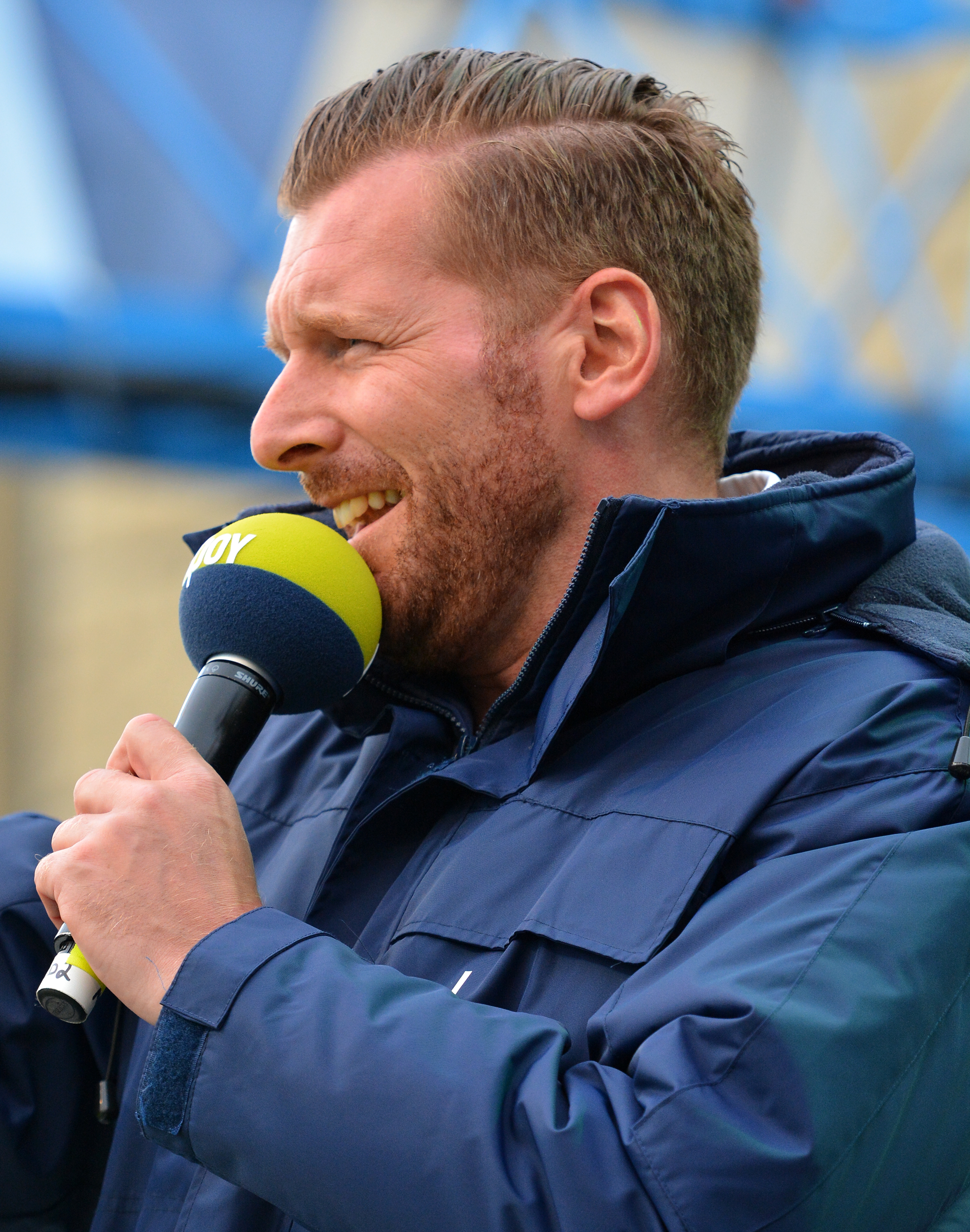 Der N-Joy Moderator Andreas Kuhlage auf der NDR-Bühne beim 825. Hamburger Hafengeburtstag 2014